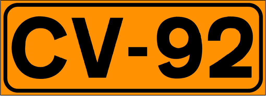 Inidcador de la Carretera de la Comunidad Valenciana CV-91